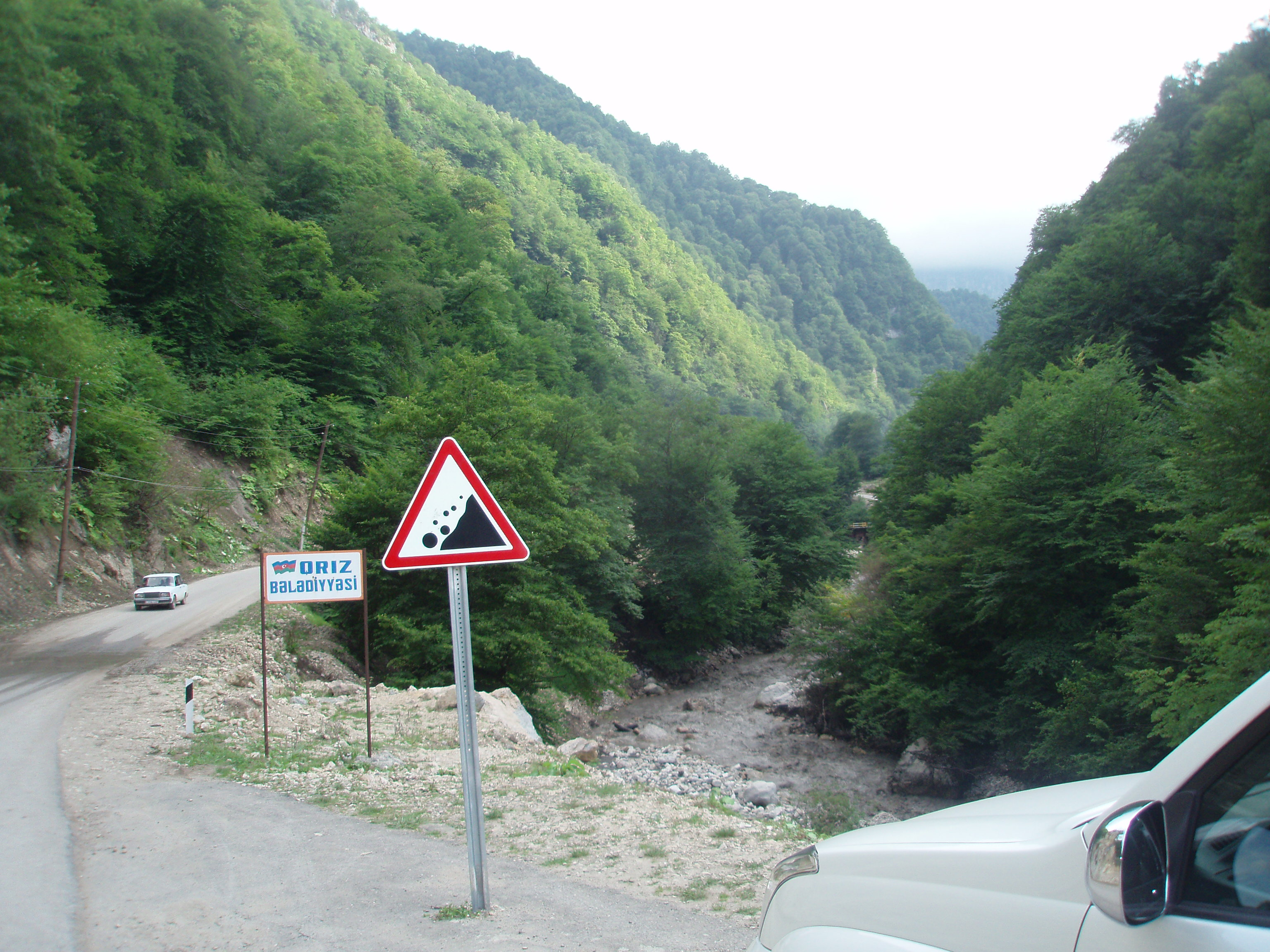 Qrız bələdiyyəsi, avqust 2009